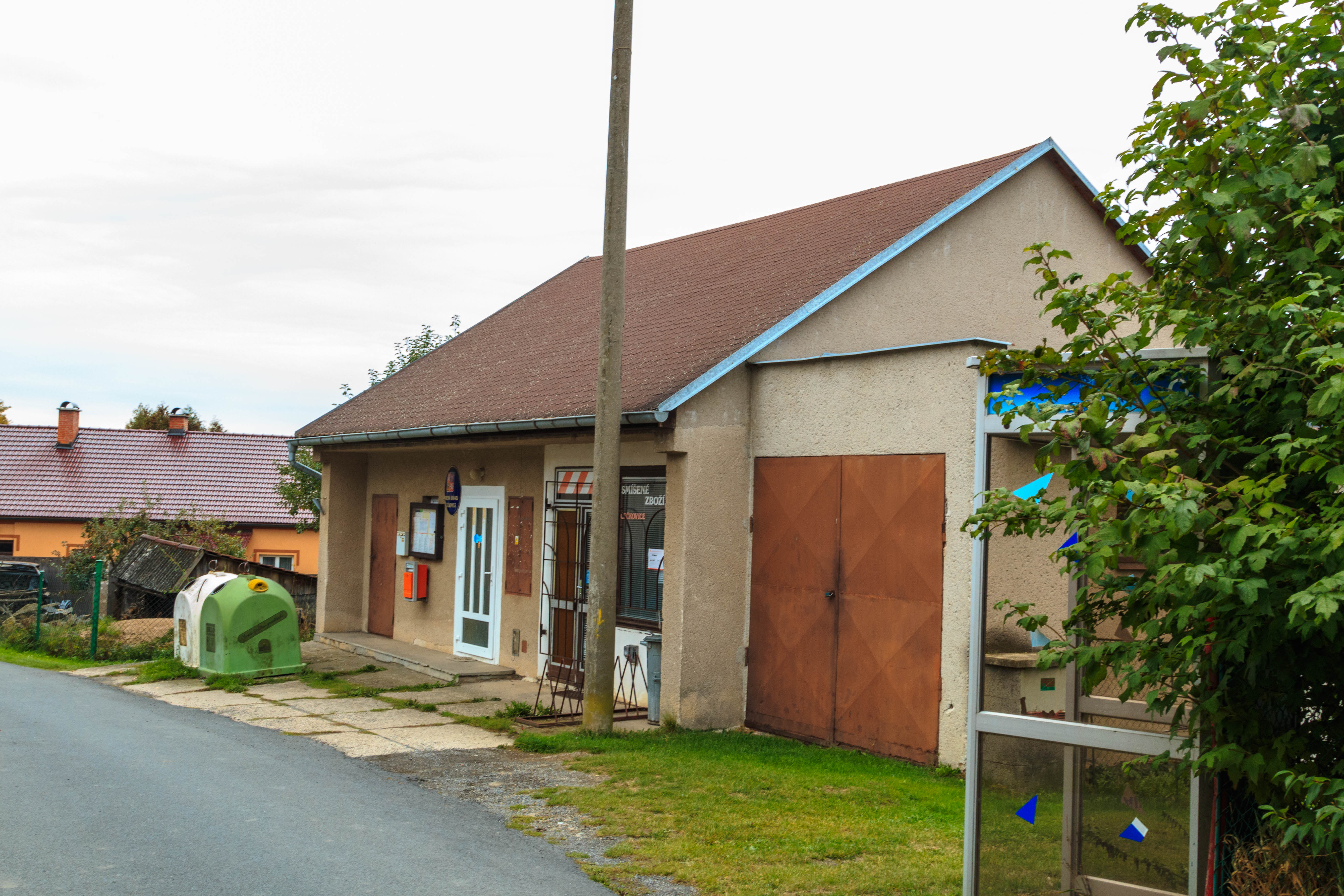 Čečkovice obecní úřad